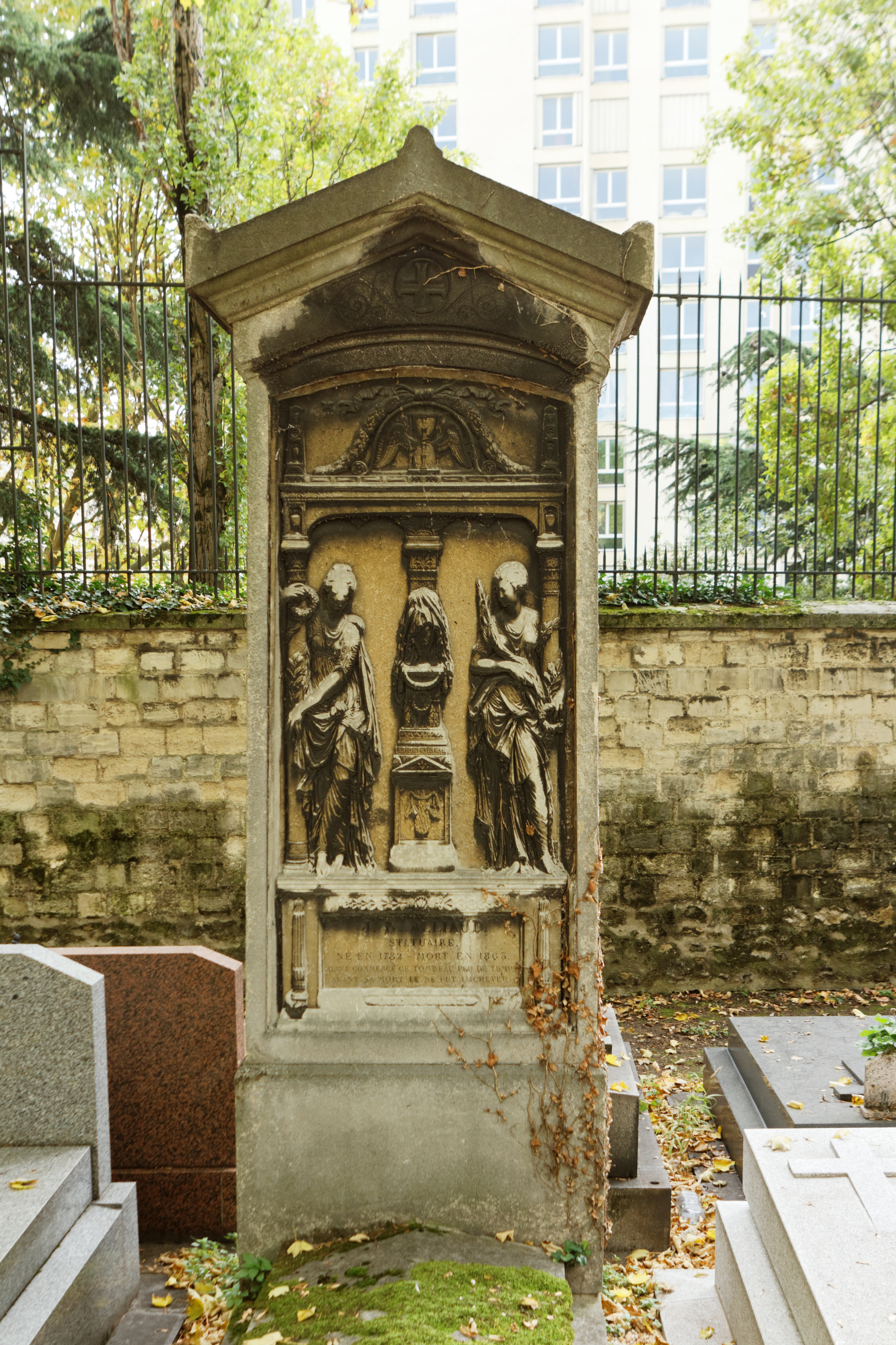 Sépulture de Jean-Baptiste Alliaud (1782-1865), statuaire.